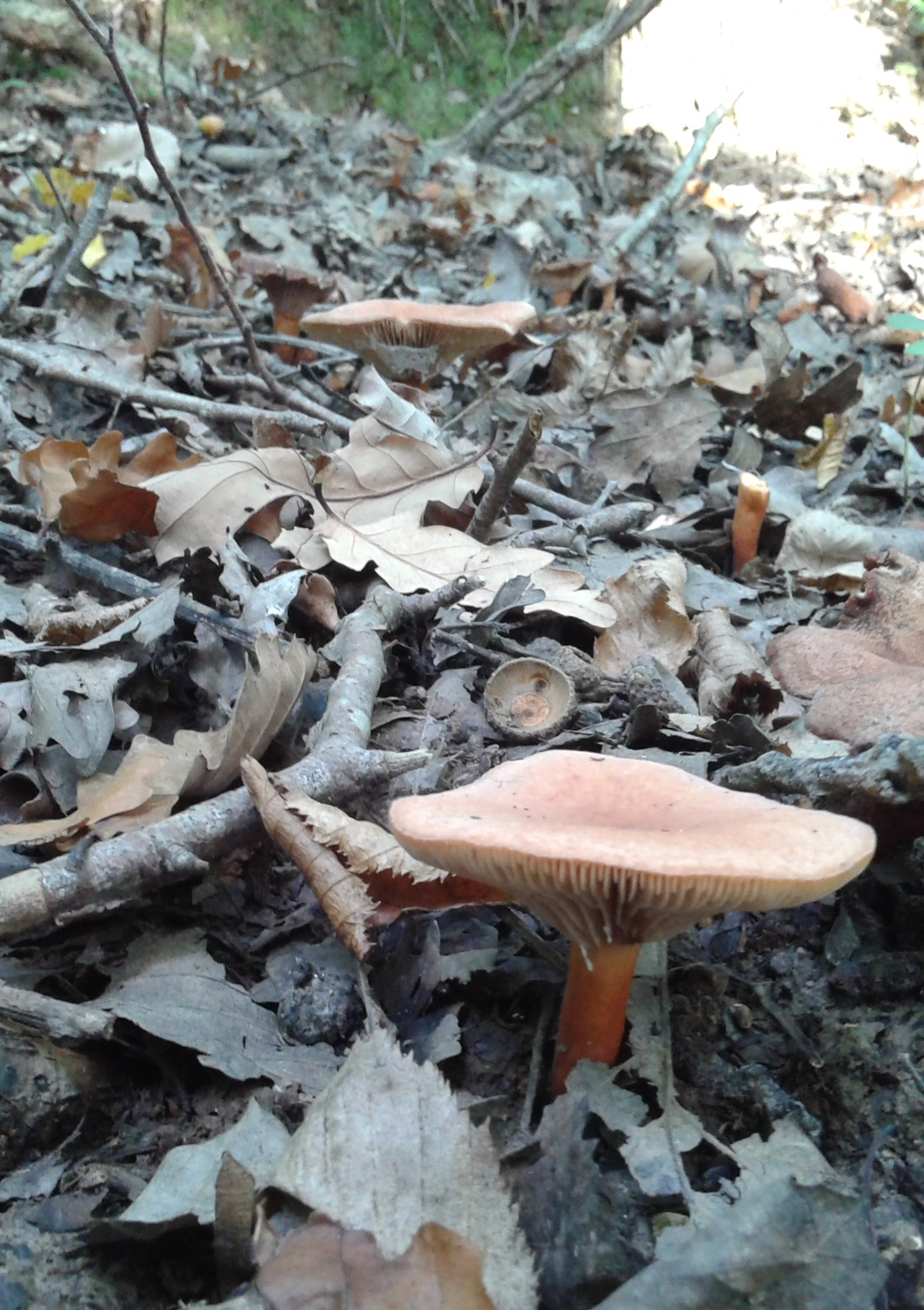 lactaire hépatique, lactarius hepaticus nord pas de calais octobre 2015